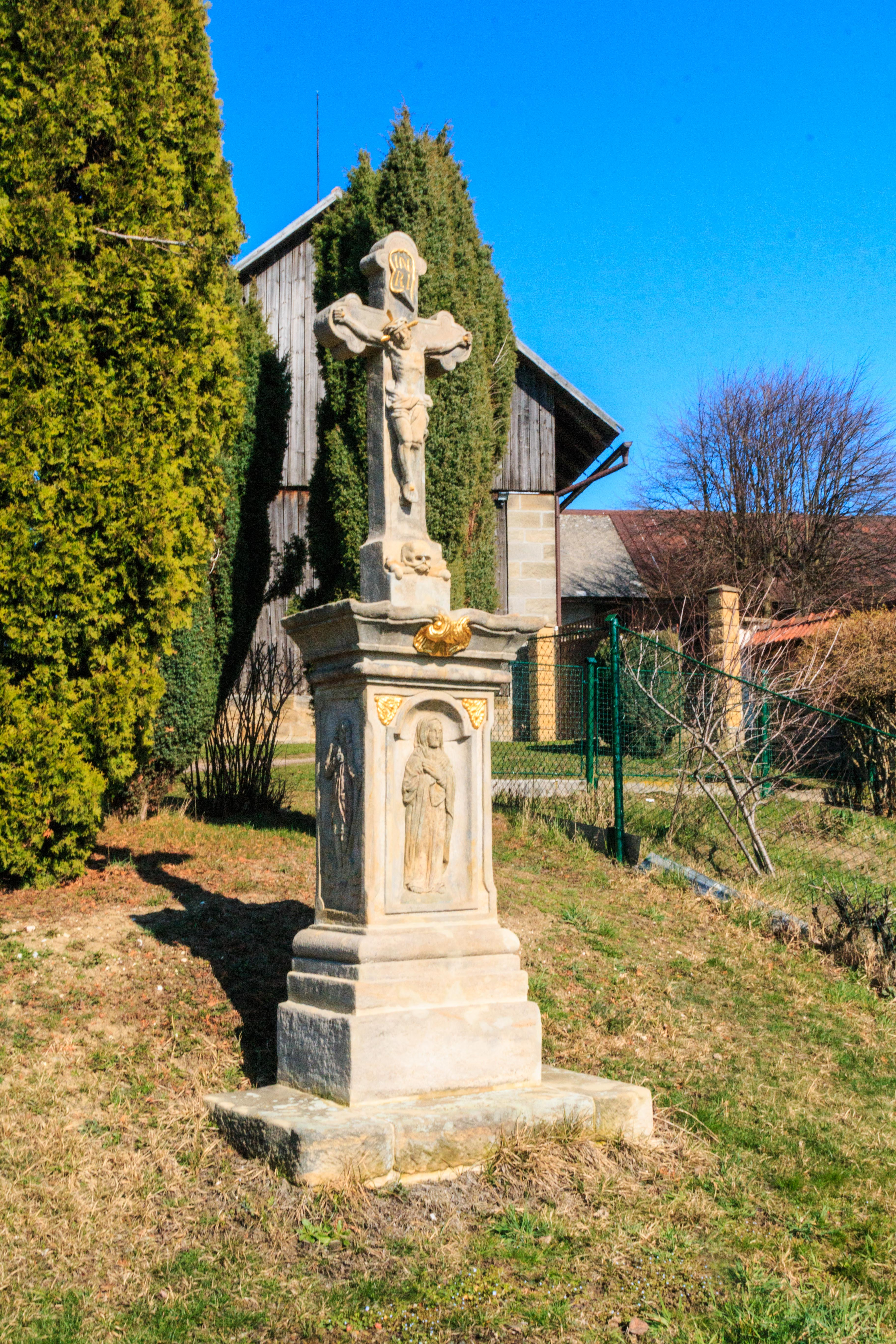 Krucifix ve Staňkově Lhotě